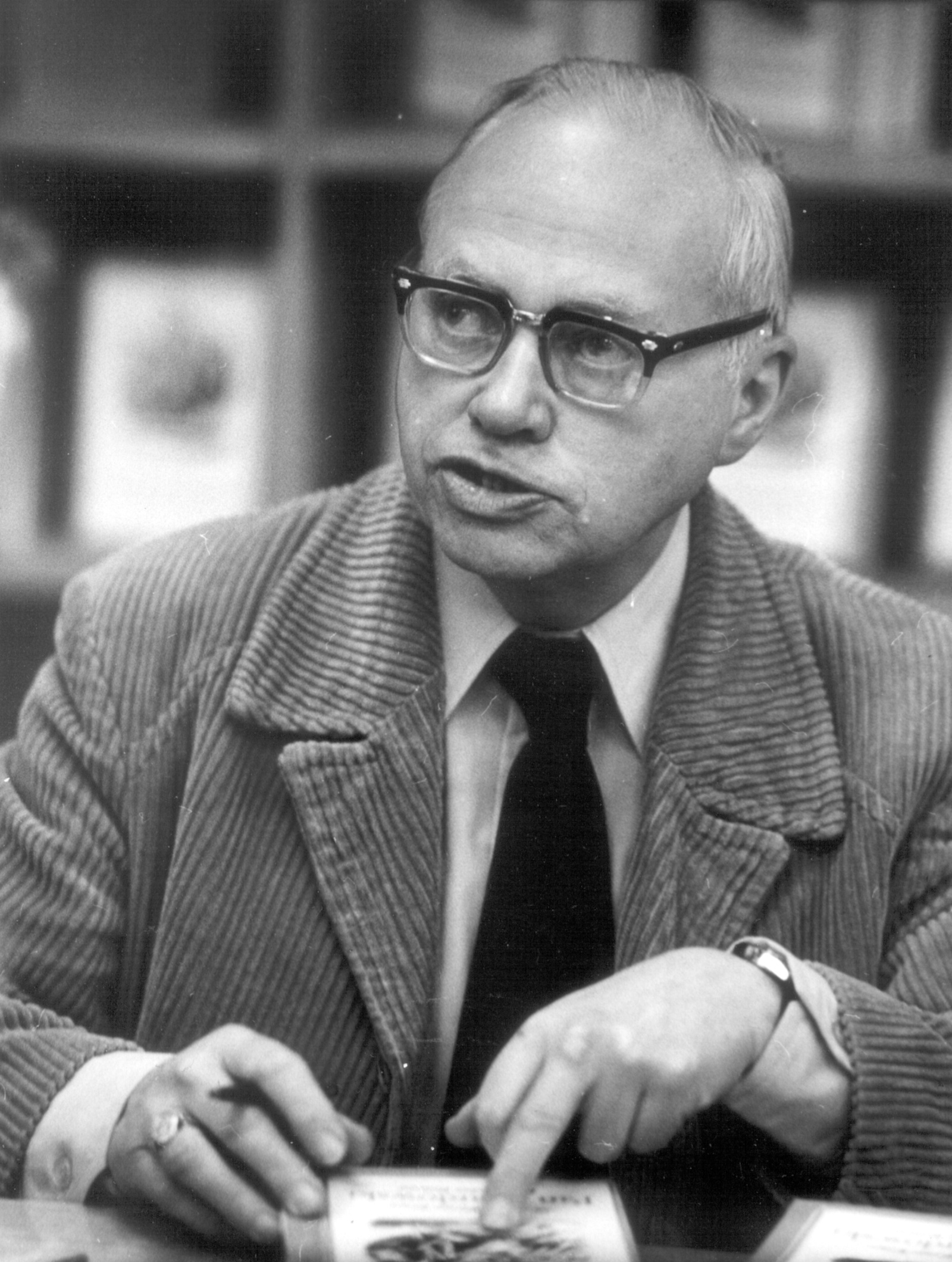 Original image description from the Deutsche Fotothek Matthias Werner Kruse, Schriftsteller